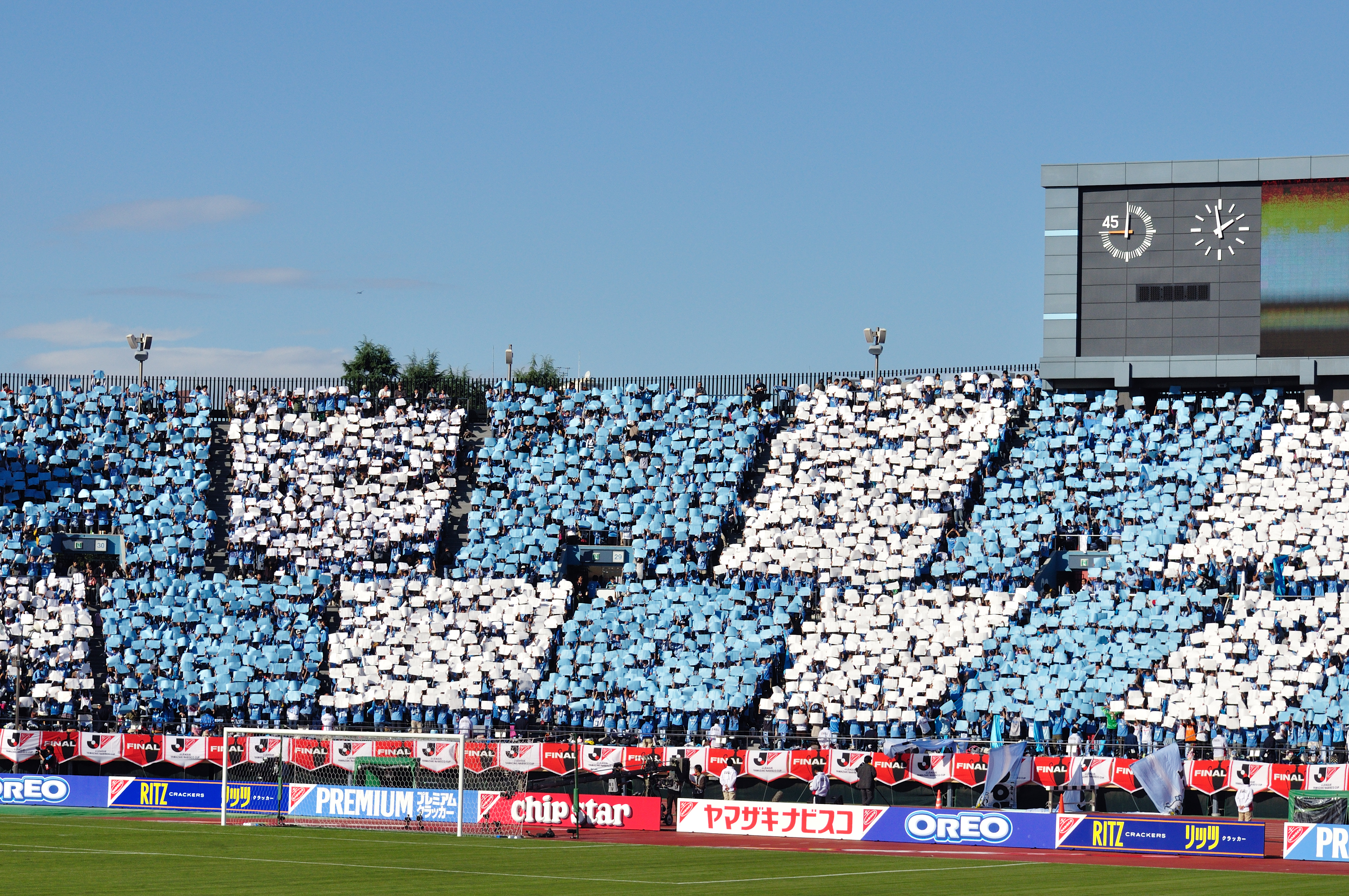 Jubilo Iwata - 2010 J-league cup final - fans